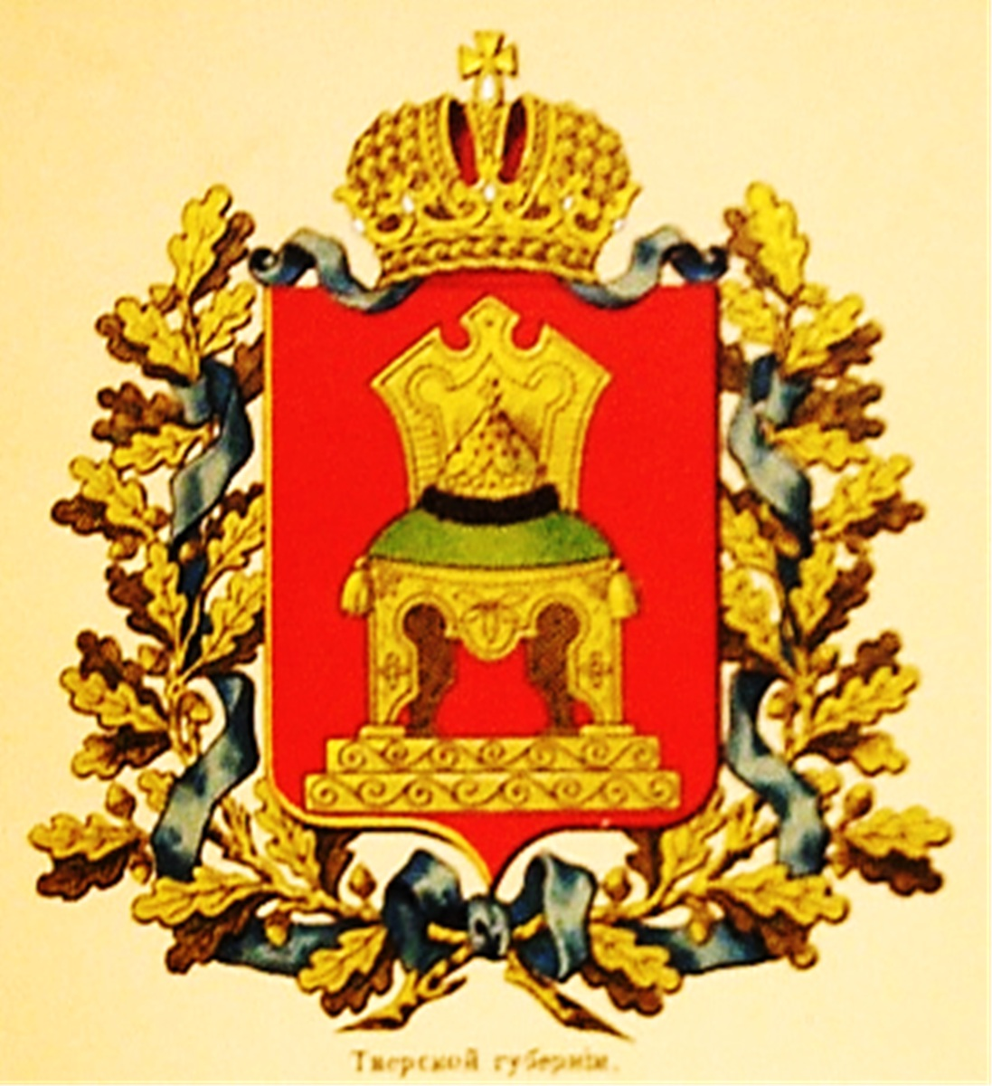 Russian Empire coat of arms Tver Governorate. Paper non-post card of Russian Empire. Герб Российской Империи Тверской губернии издания Сукачова, СПб. Непочтовая карточка Российской Империи.